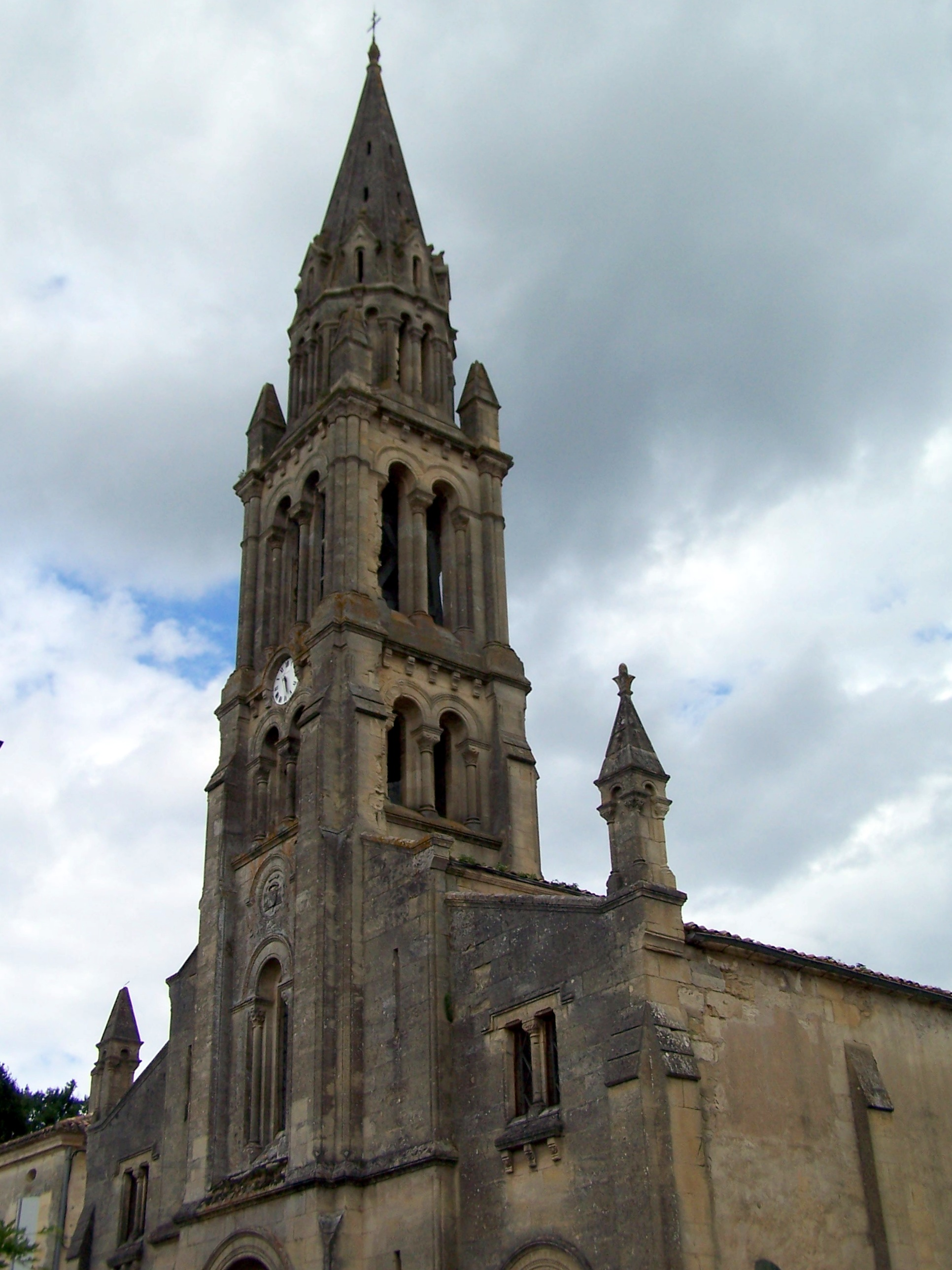 Église Saint-Hilaire de Paillet .